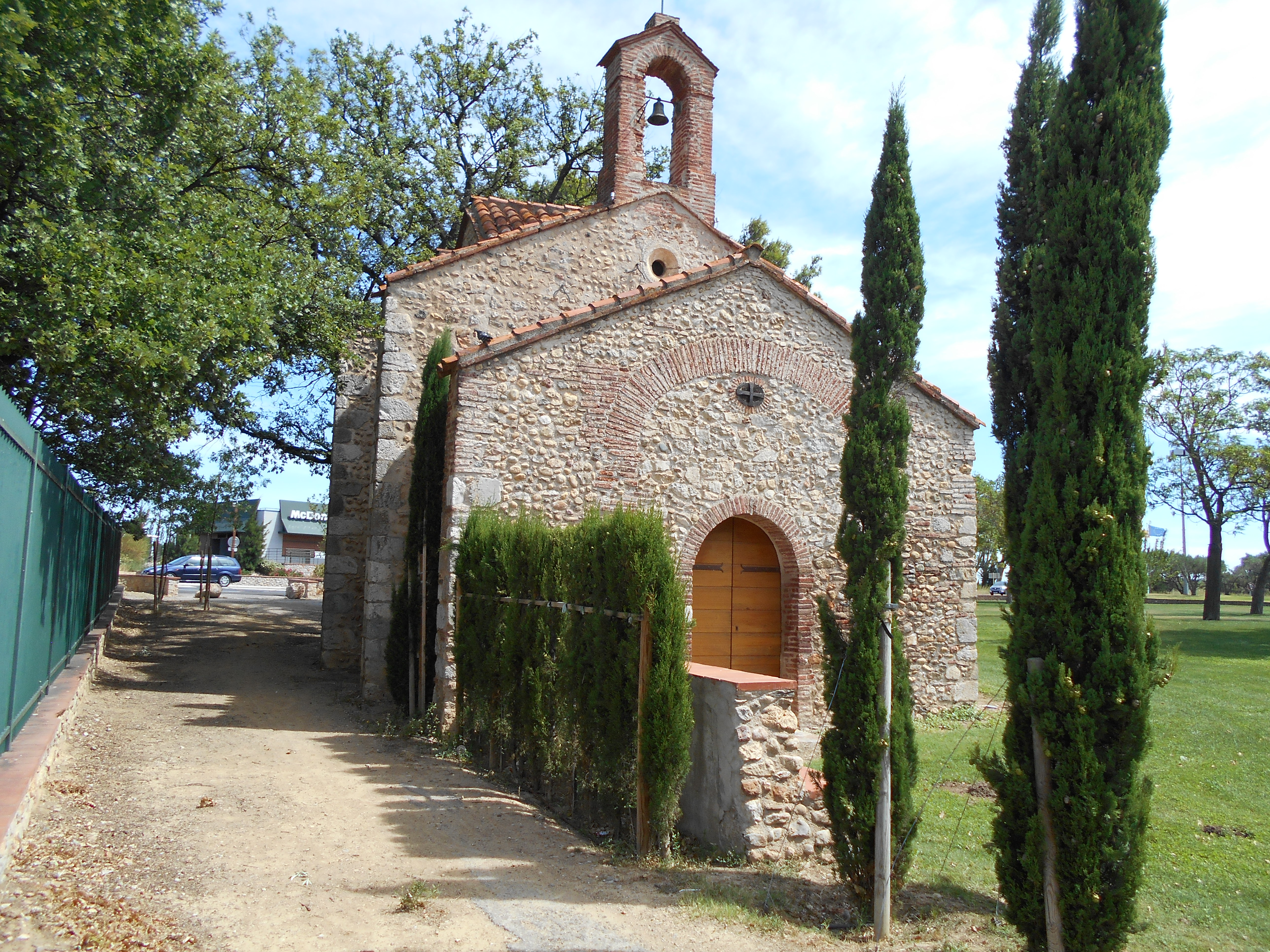 La Mare de Déu de la Pietat de Tuïr